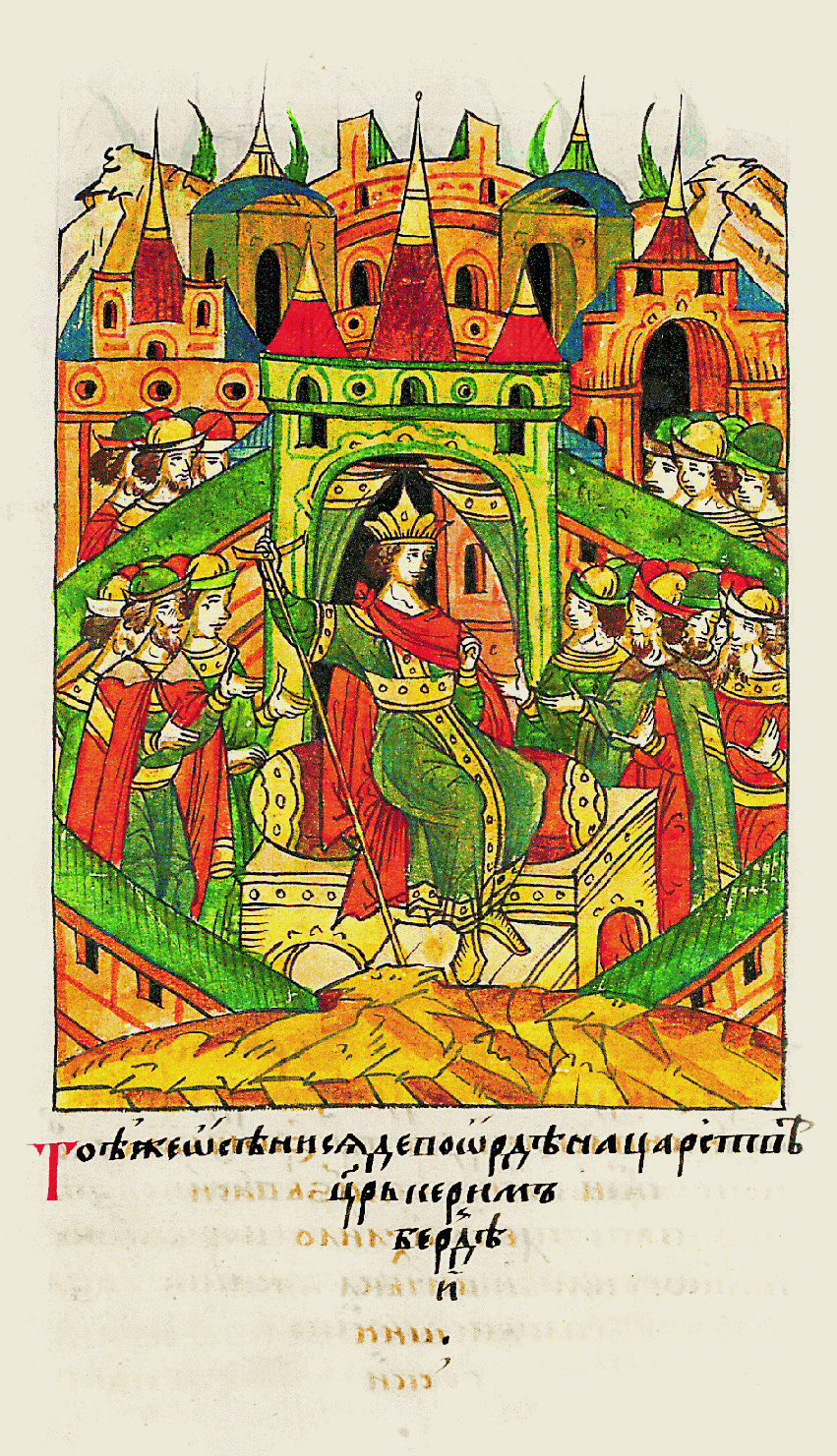 В ту же осень во- царился в Орде царь Керим- Бердей.